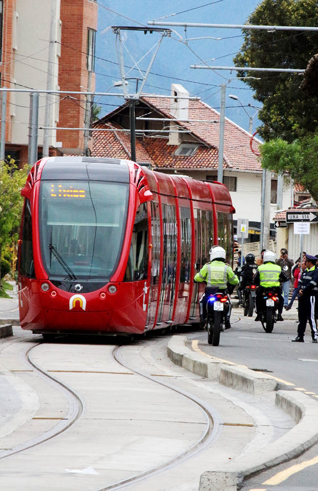 El Tranvía de Cuenca (Ecuador) durante un recorrido de prueba el 27 de julio de 2018.